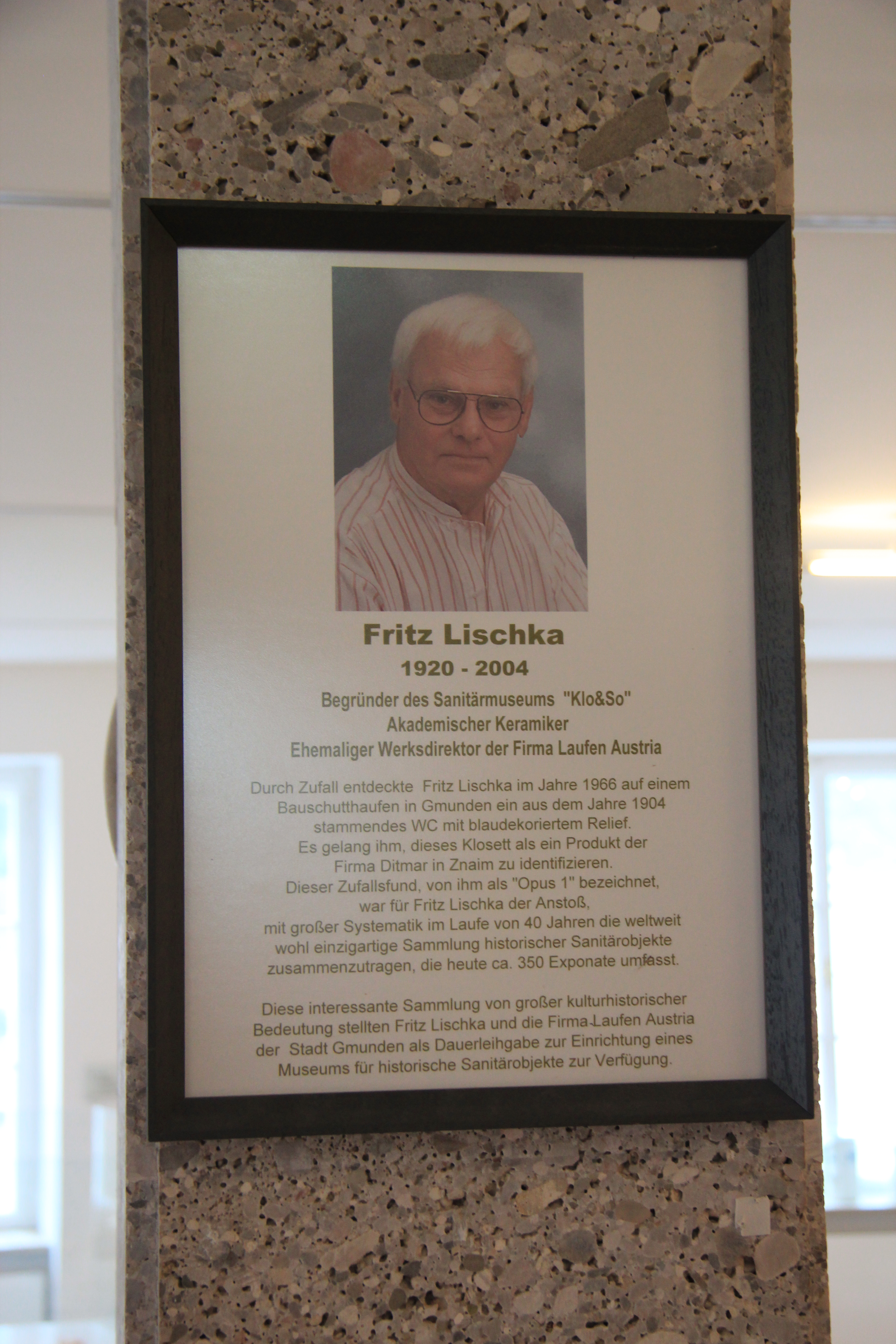 Ausstellungsstück(e) in den Kammerhofmuseen in Gmunden, Oberösterreich